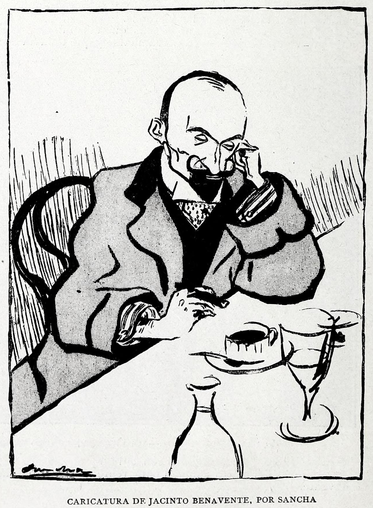 Caricatura de Jacinto Benavente, por Sancha.